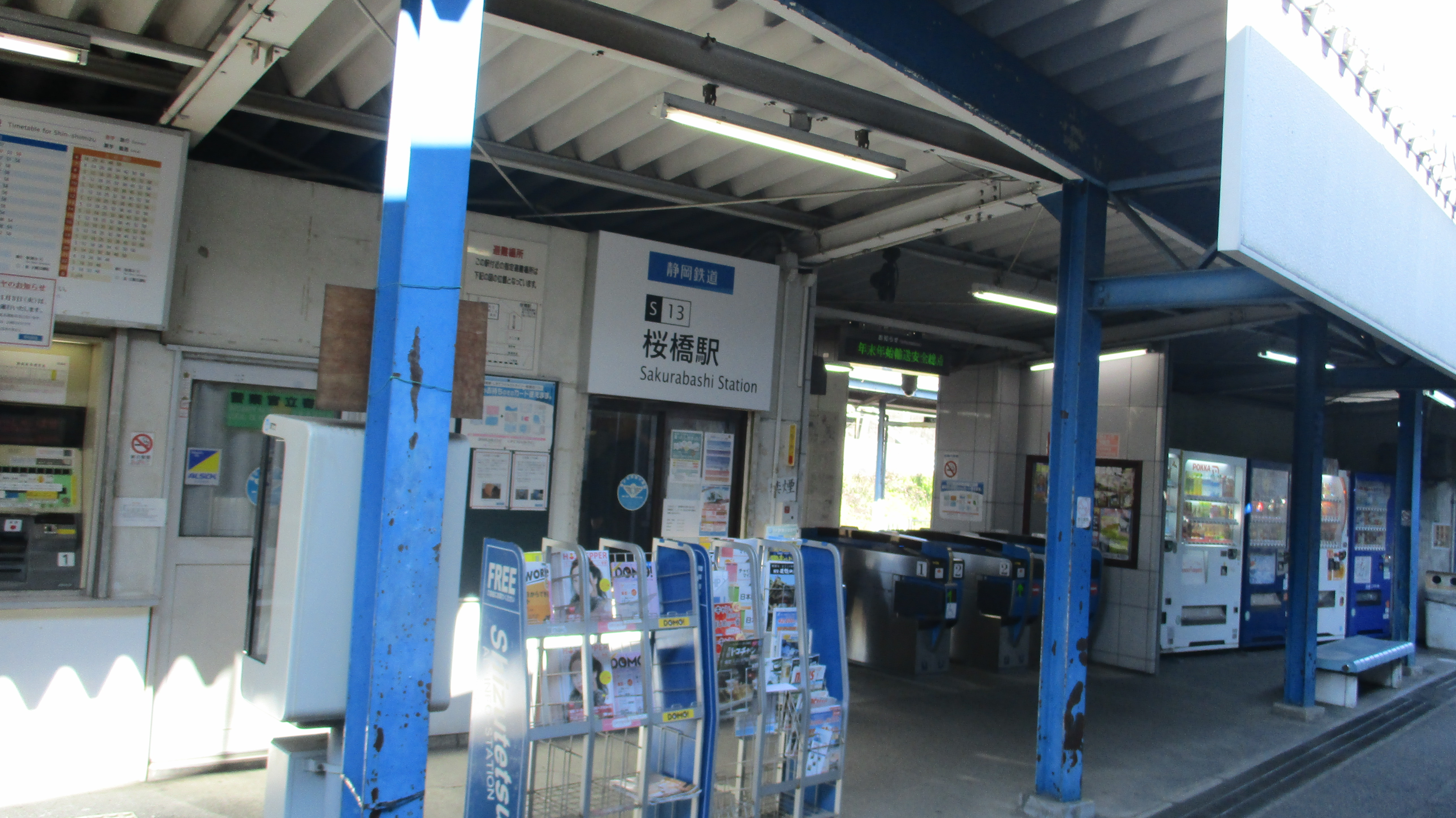 桜橋(静岡鉄道)の駅舎